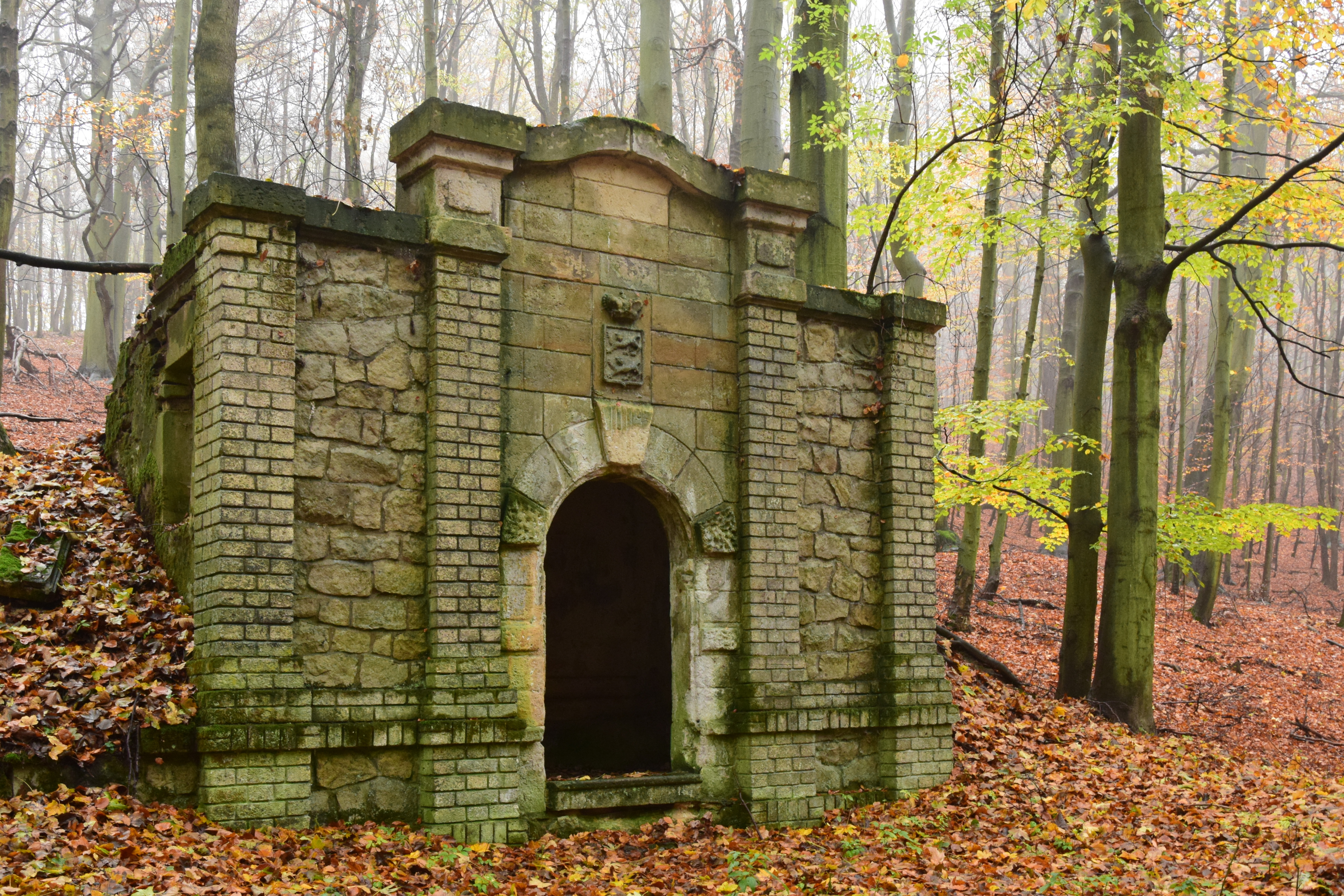 Přírodní památka Červený Hrádek – stará vodárna